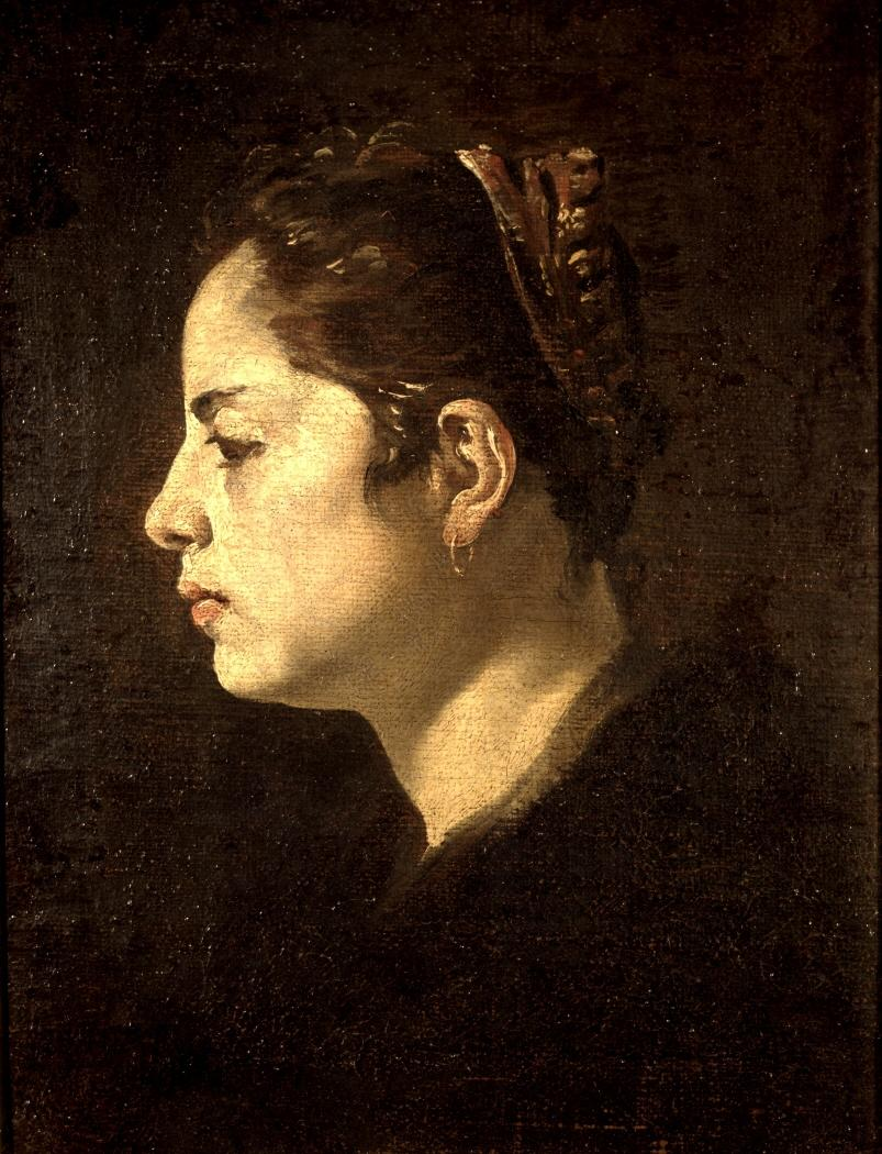 Retrato de una joven mujer de perfil.